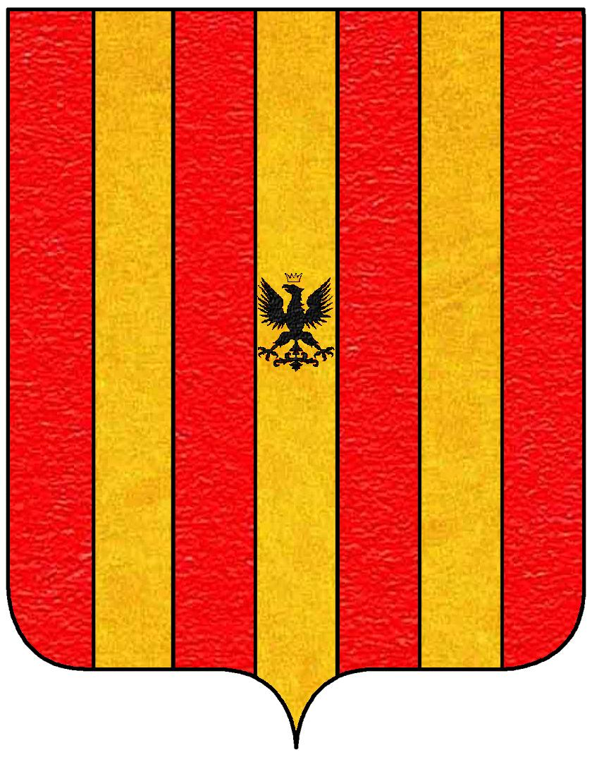 Stemma della famiglia Gallarati Scotti